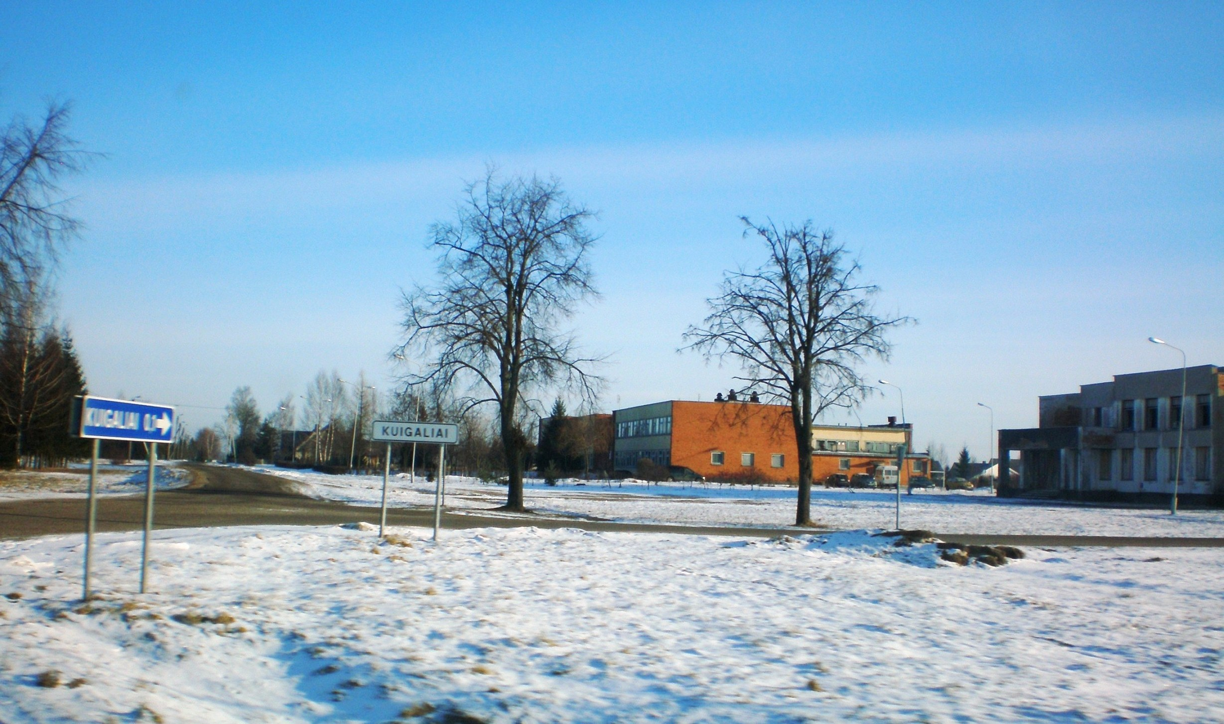 Kuigaliai, Jonavos raj.